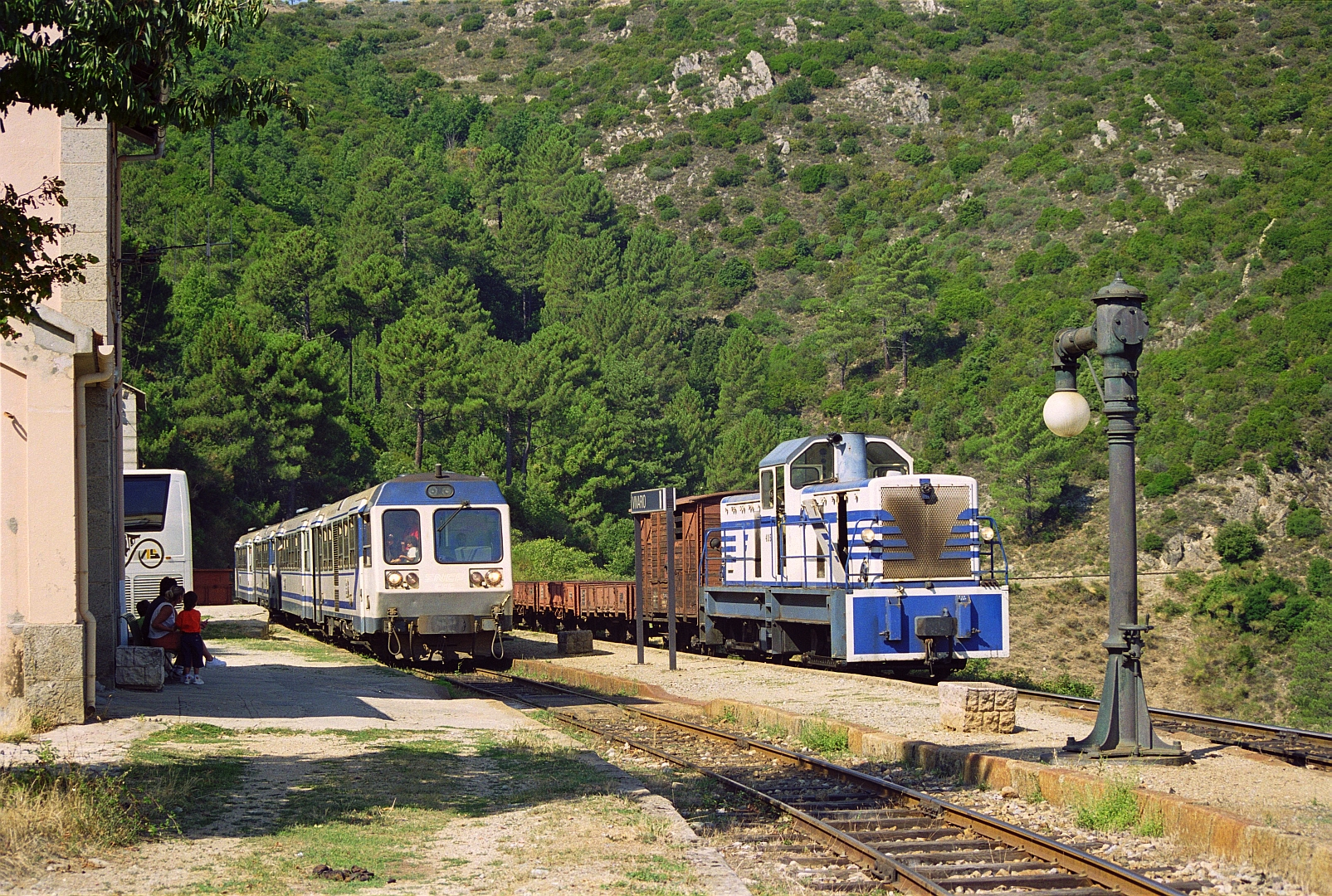 Un train de voyageurs Ajaccio-Bastia dépasse le train de marchandises en gare de Vivario le 18 août 2000.